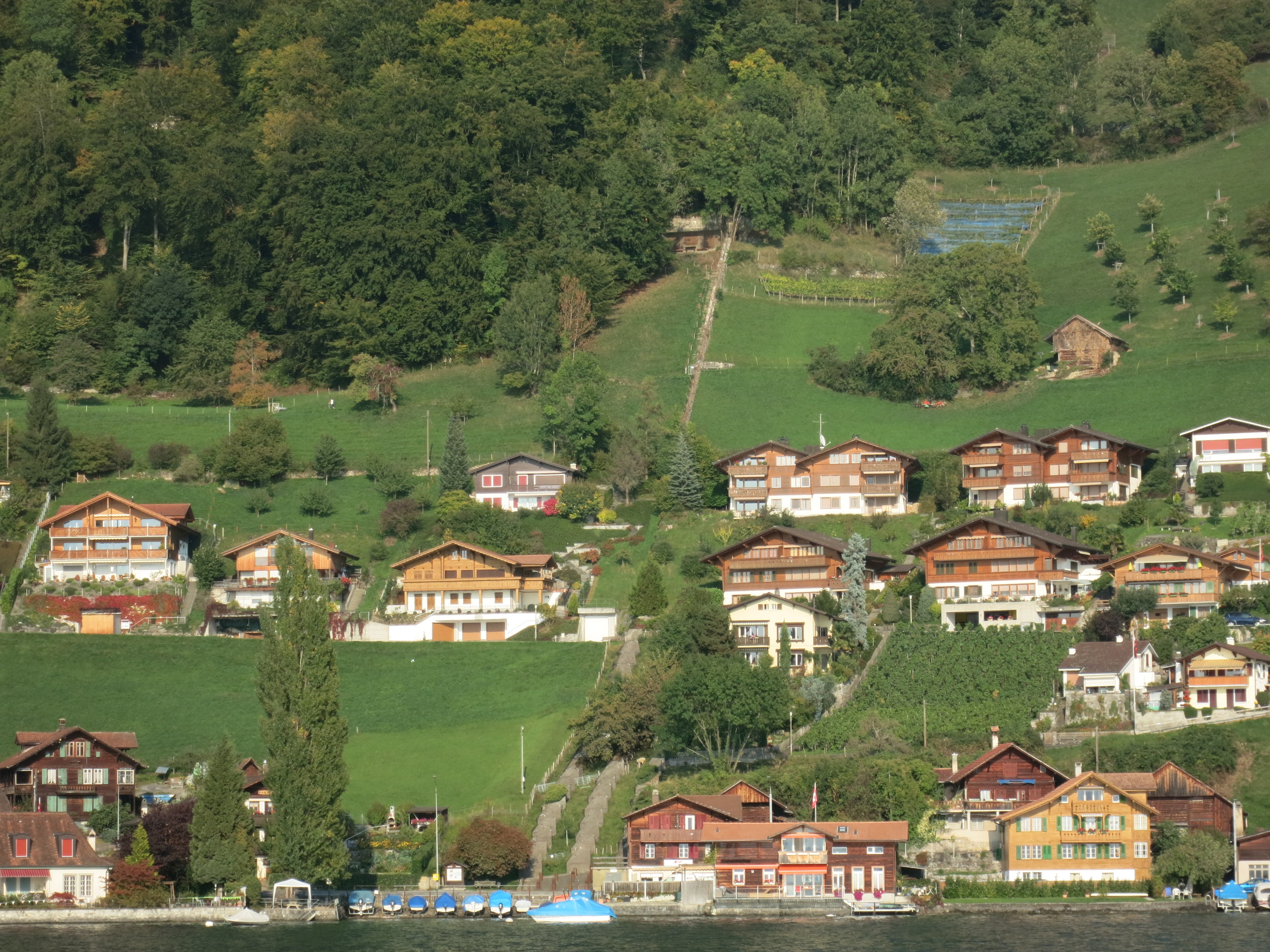 Sperrstelle Merligen BE, Schweiz